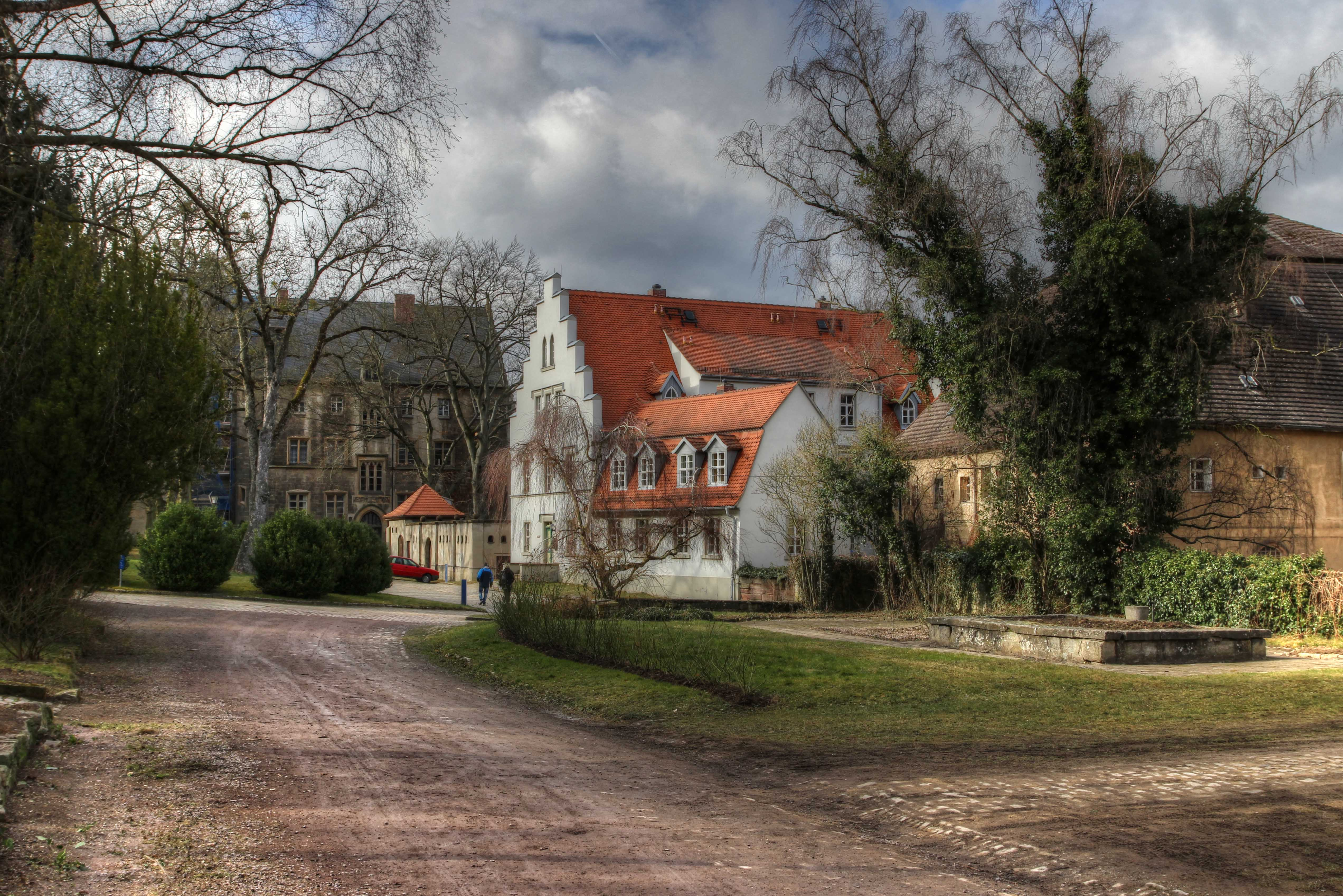 Außenansicht der Klosteranlagen Schulpforte